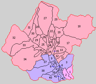 山梨県北巨摩郡の町村。